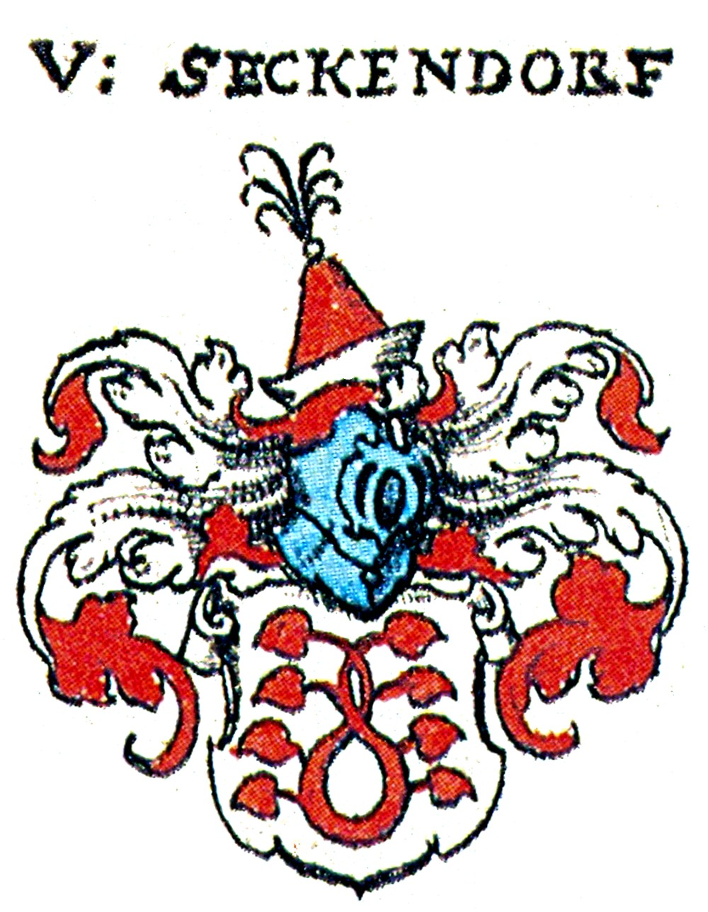 Wappen der Fränkischen Adelsfamilie Seckendorff